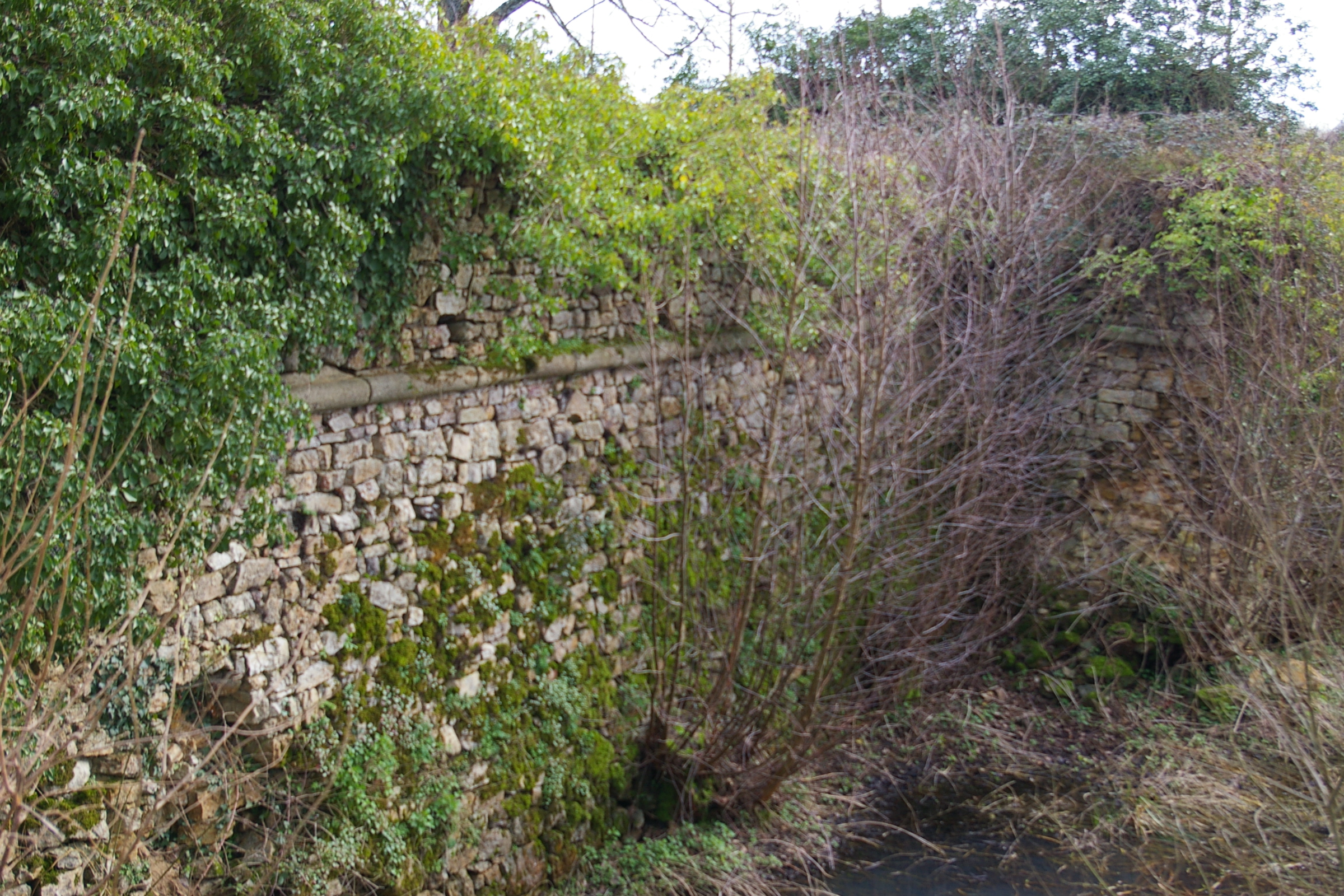 manoir de Michel Luette à Blandouet